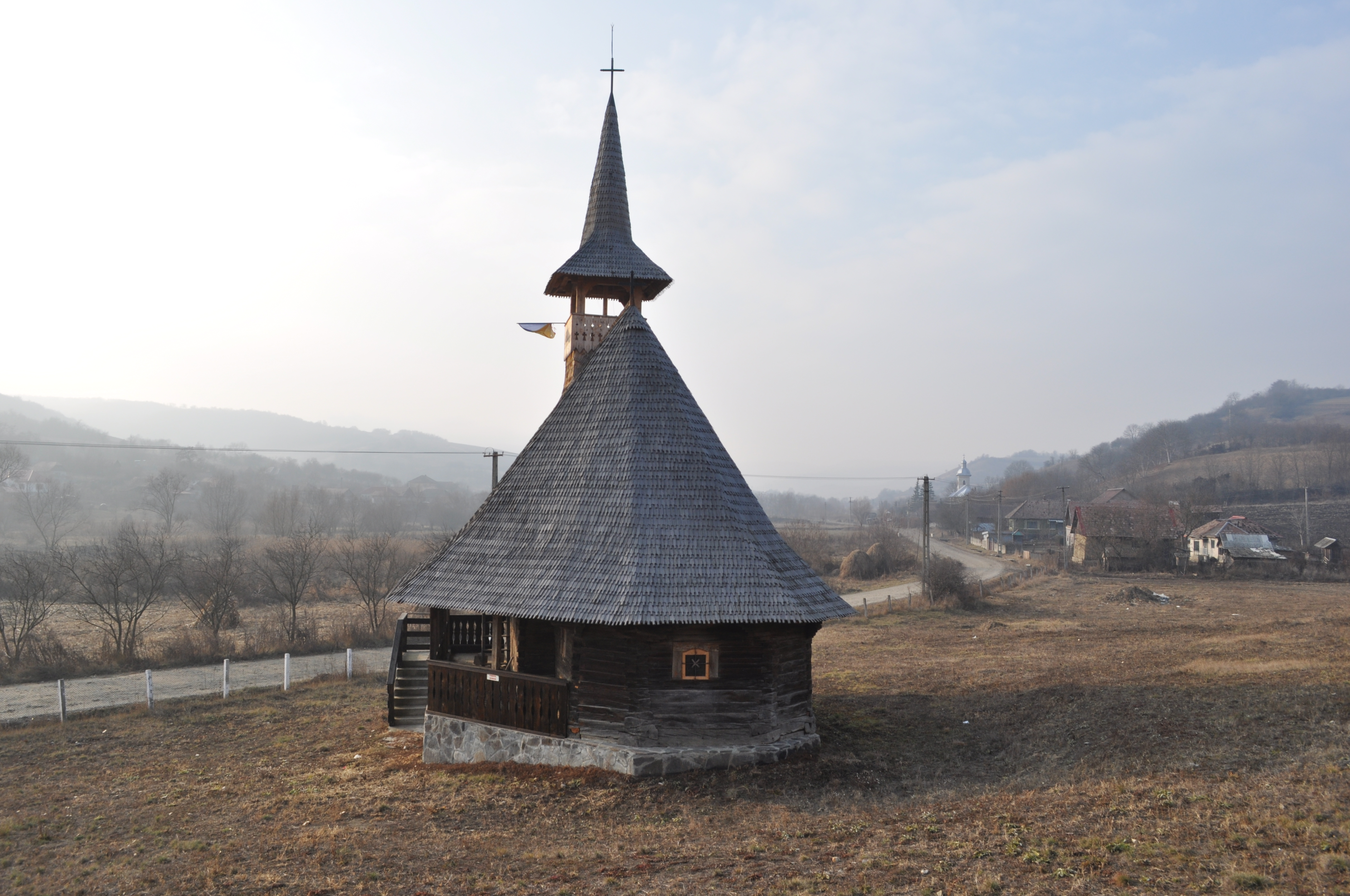 Biserica de lemn "Sfântul Petru" din Mureșenii de Câmpie